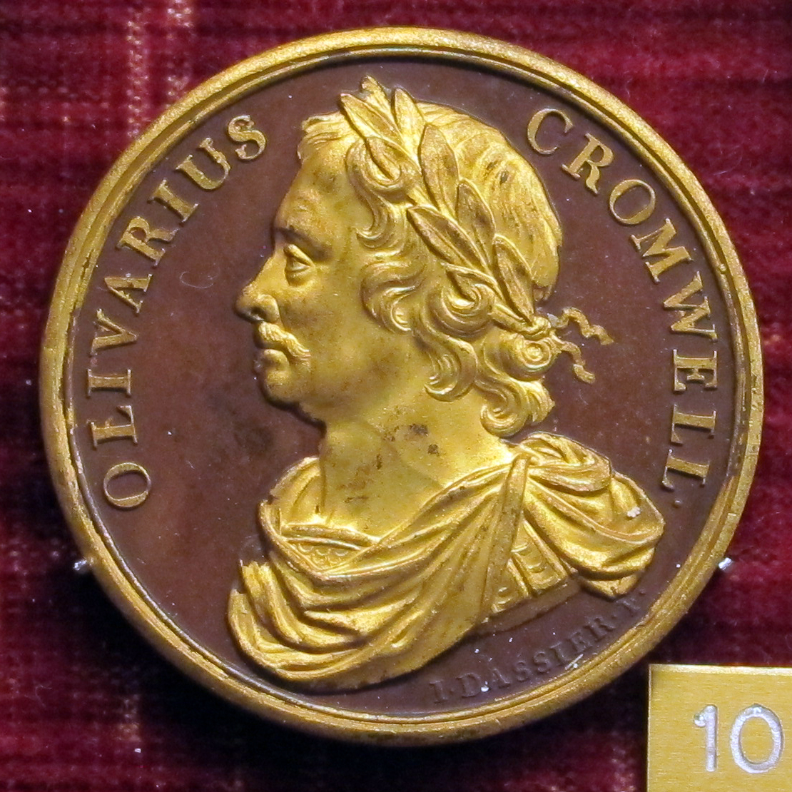 Medaglia inglese